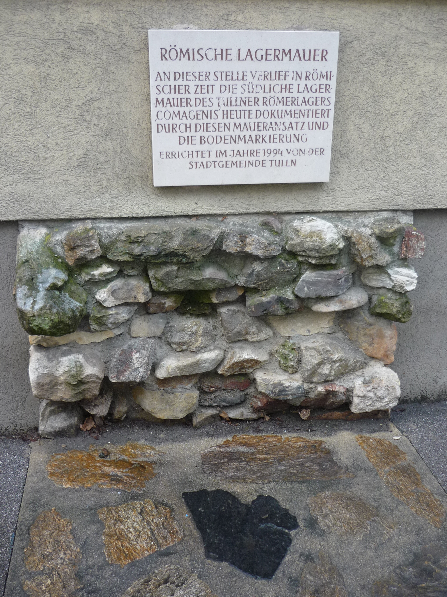 Kastell Comagenis in Tulln, Lagermauer Süd